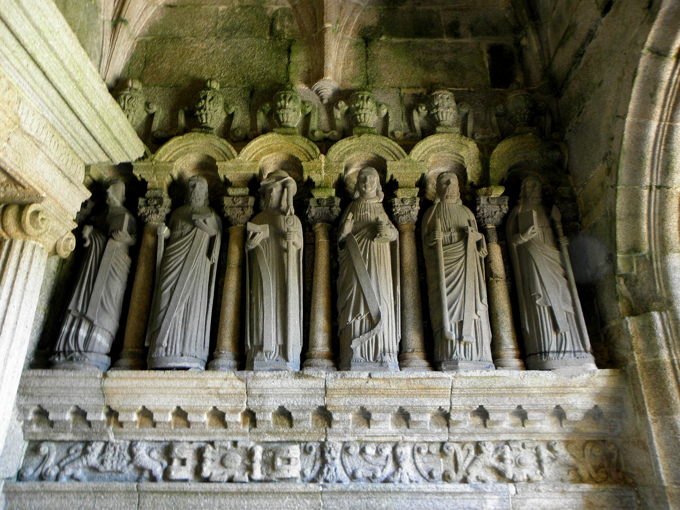 Porche sud de l'église Saint-Goulven de Goulven (29). Costale intérieure est.